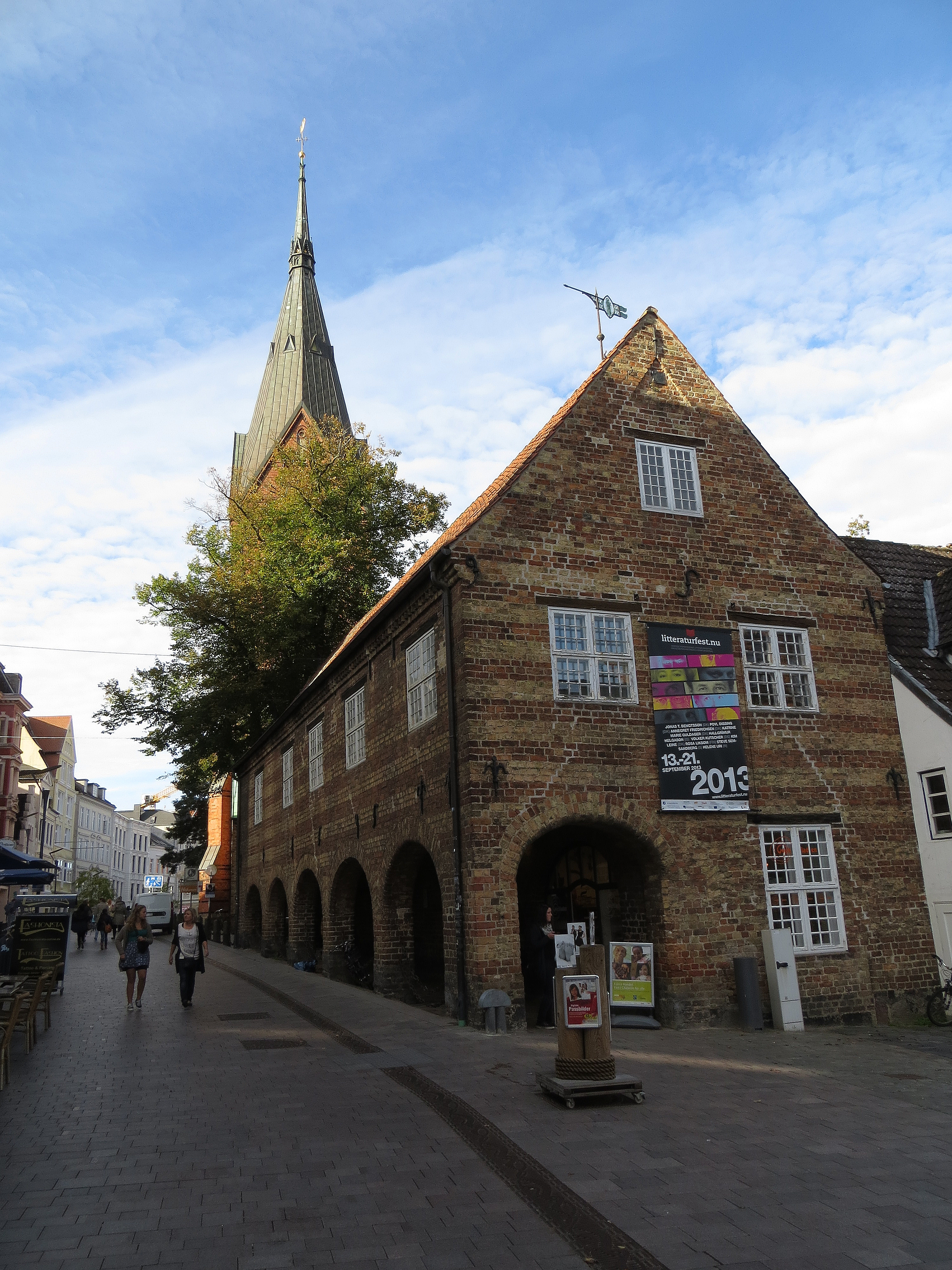 Flensburger Schrangen, Bild 02; historischer Verbindungsbau zwischen Marienkirche und dem Nordermarkt